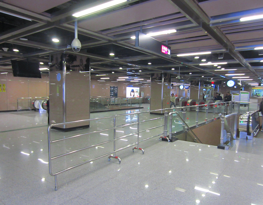 黃沙站6號線站廳